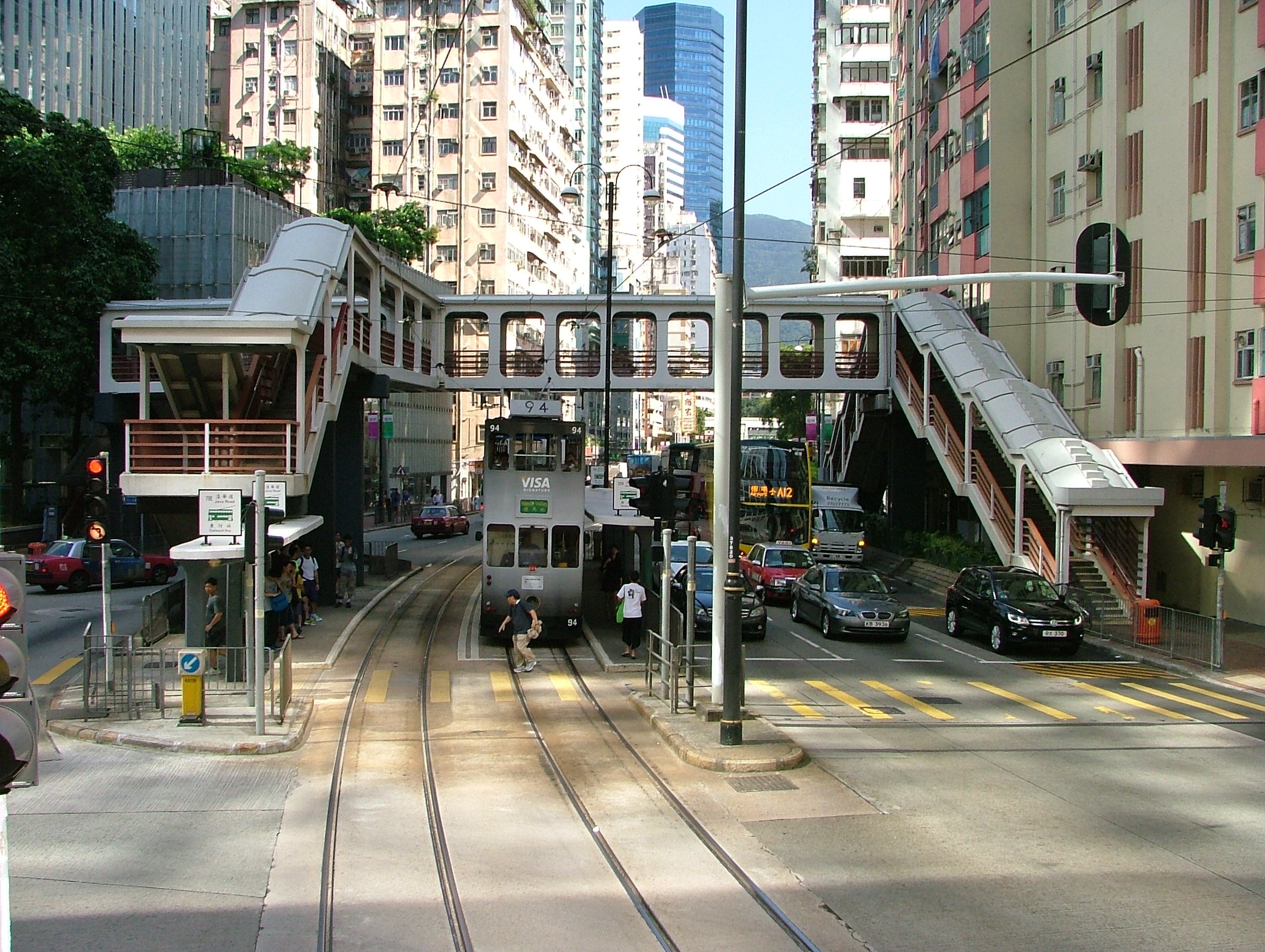 Wikimania HongKong